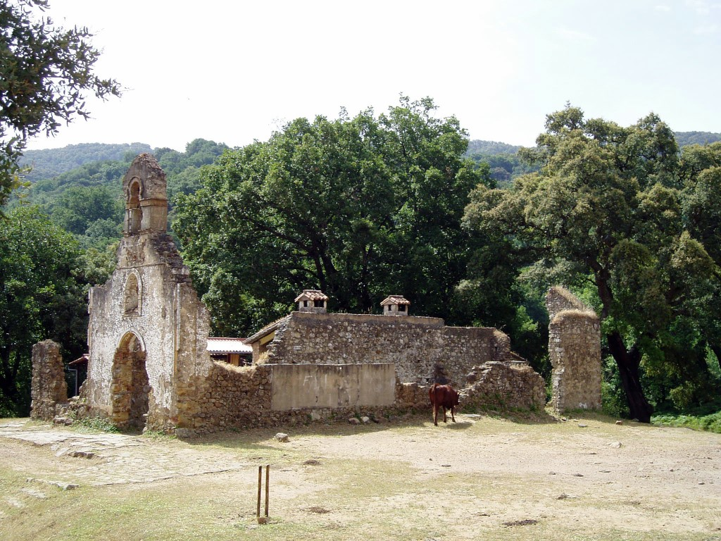 La Sauceda